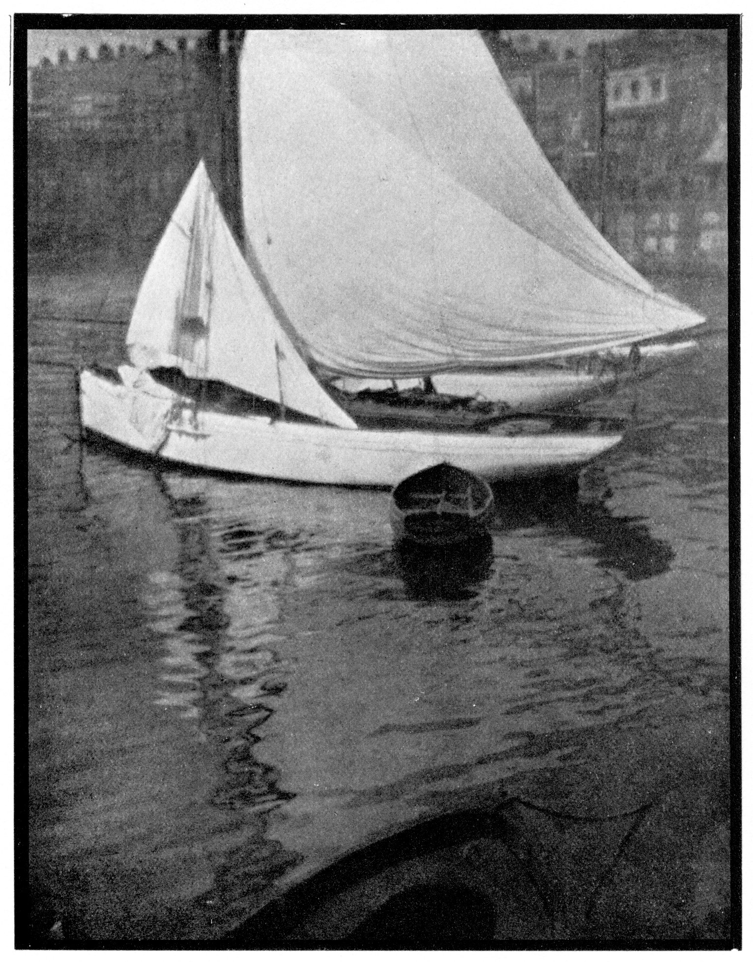 Photographie de voiliers dans un port, dans le style pictorialiste.